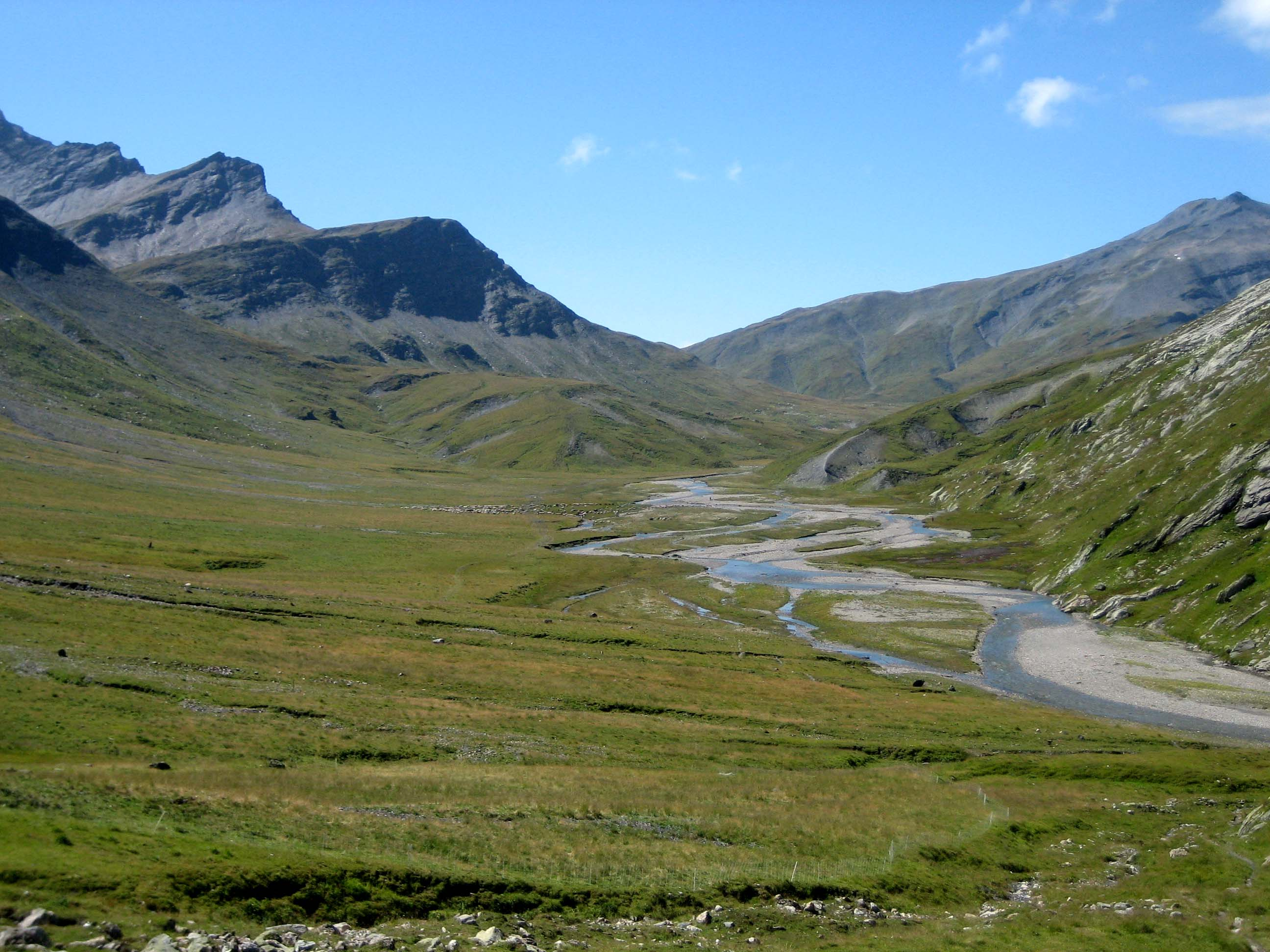 Greina, Überblick nach SW